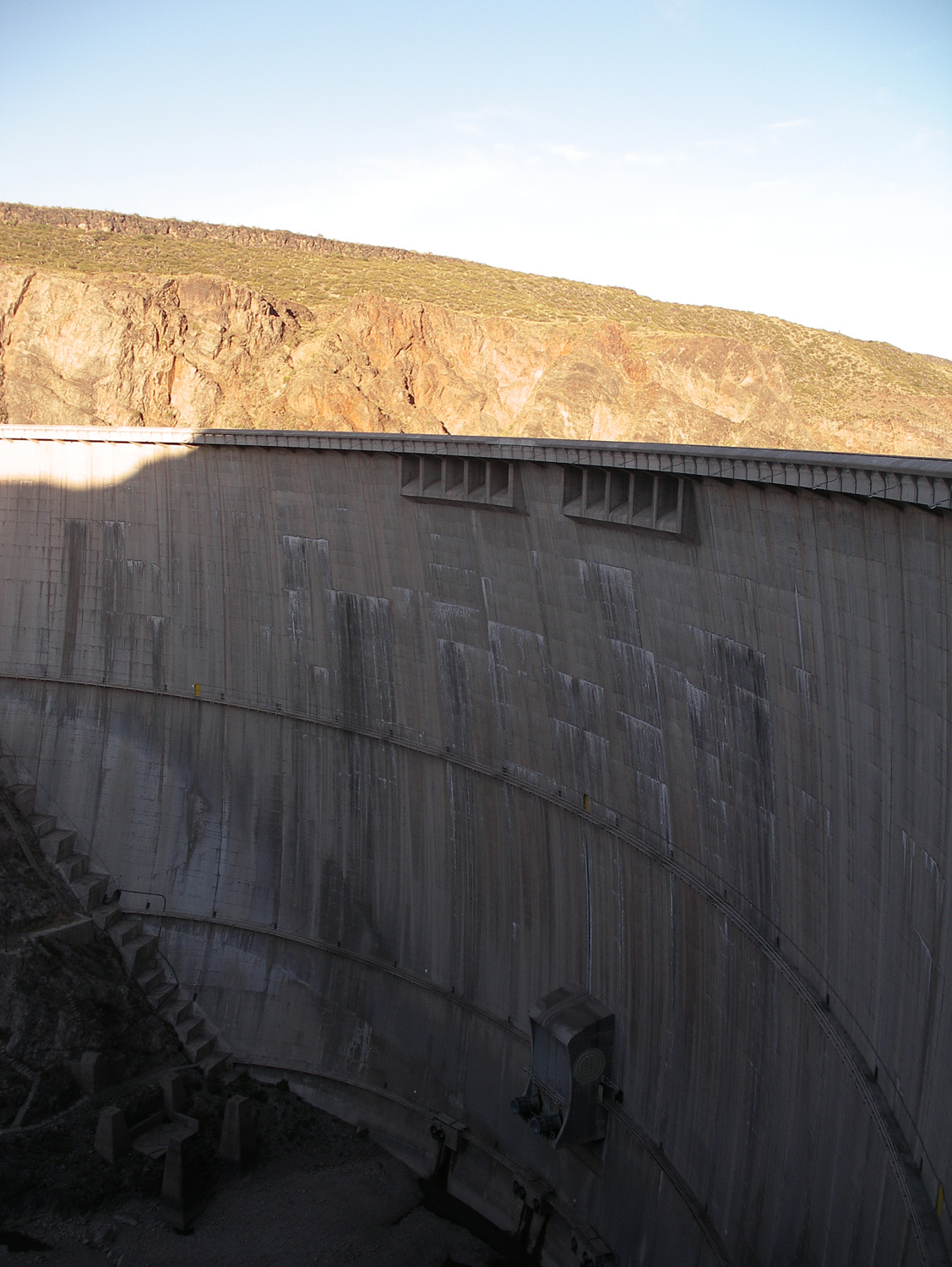 Vista del paramento de aguas abajo de la presa argentina Agua del Toro